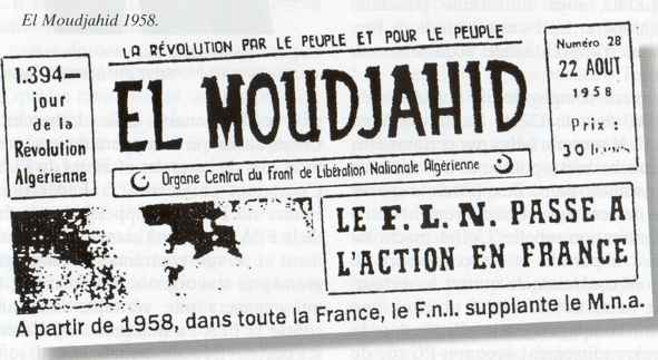 El Moudjahid Numéro 28 - 22 Août 1958